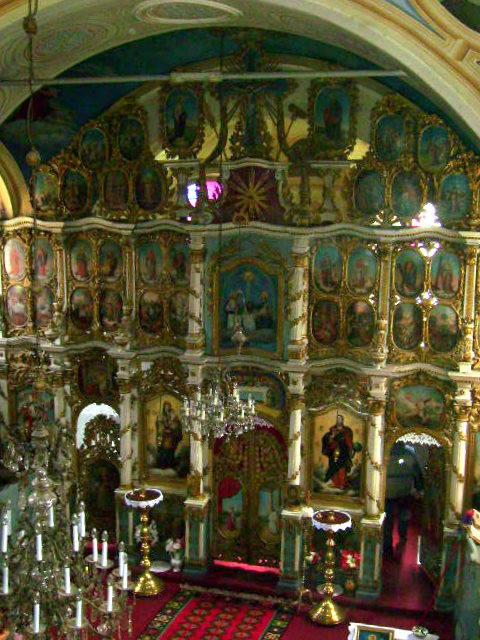 Иконостас у Православној цркви Светог Глигорија у Товаришеву